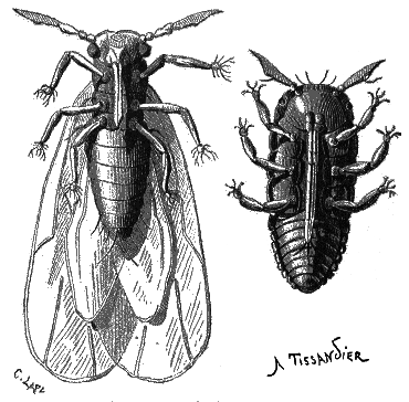 La Nature - 1873 - Fig. 3. — Phylloxéra vastatrix. Femelle ailée et jeune femelle aptère, vues en dessous et très-grossies. - p021